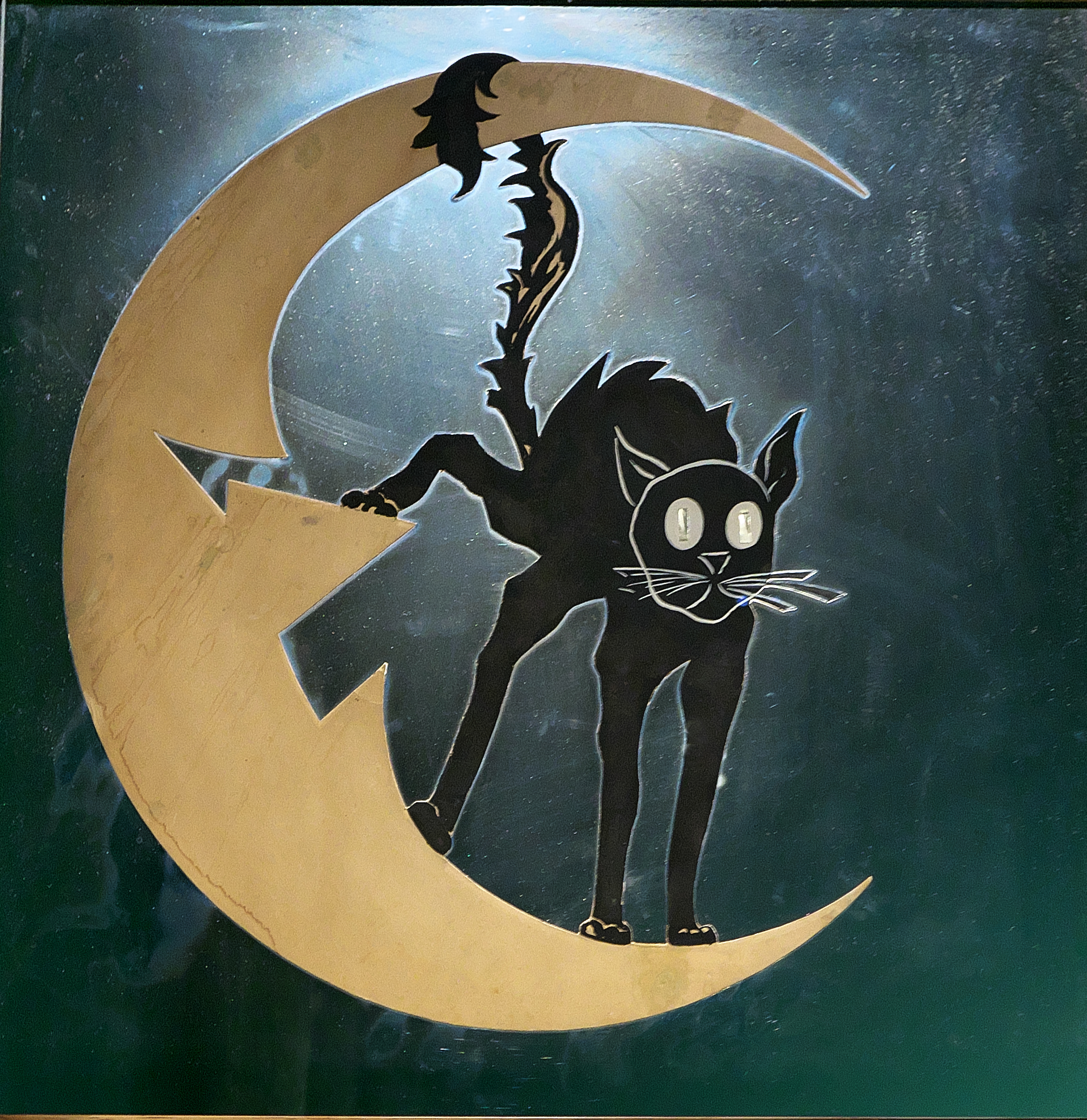 Adolphe Willette diseña un magnífico logotipo para el cabaret Le Chat Noir.